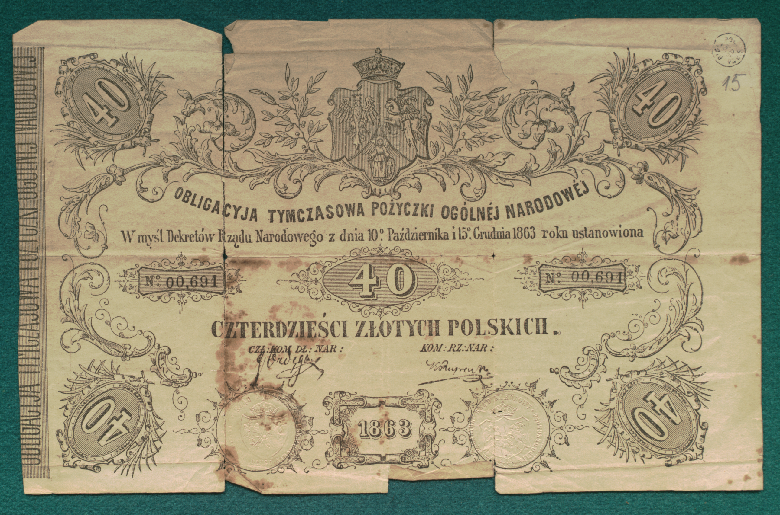 Obligacje: stała (wraz z kuponami) i tymczasowa Ogólnej Narodowej Pożyczki Polskiej, wydane przez Rząd Narodowy na okaziciela o wartości: 1000 i 40 złotych polskich.